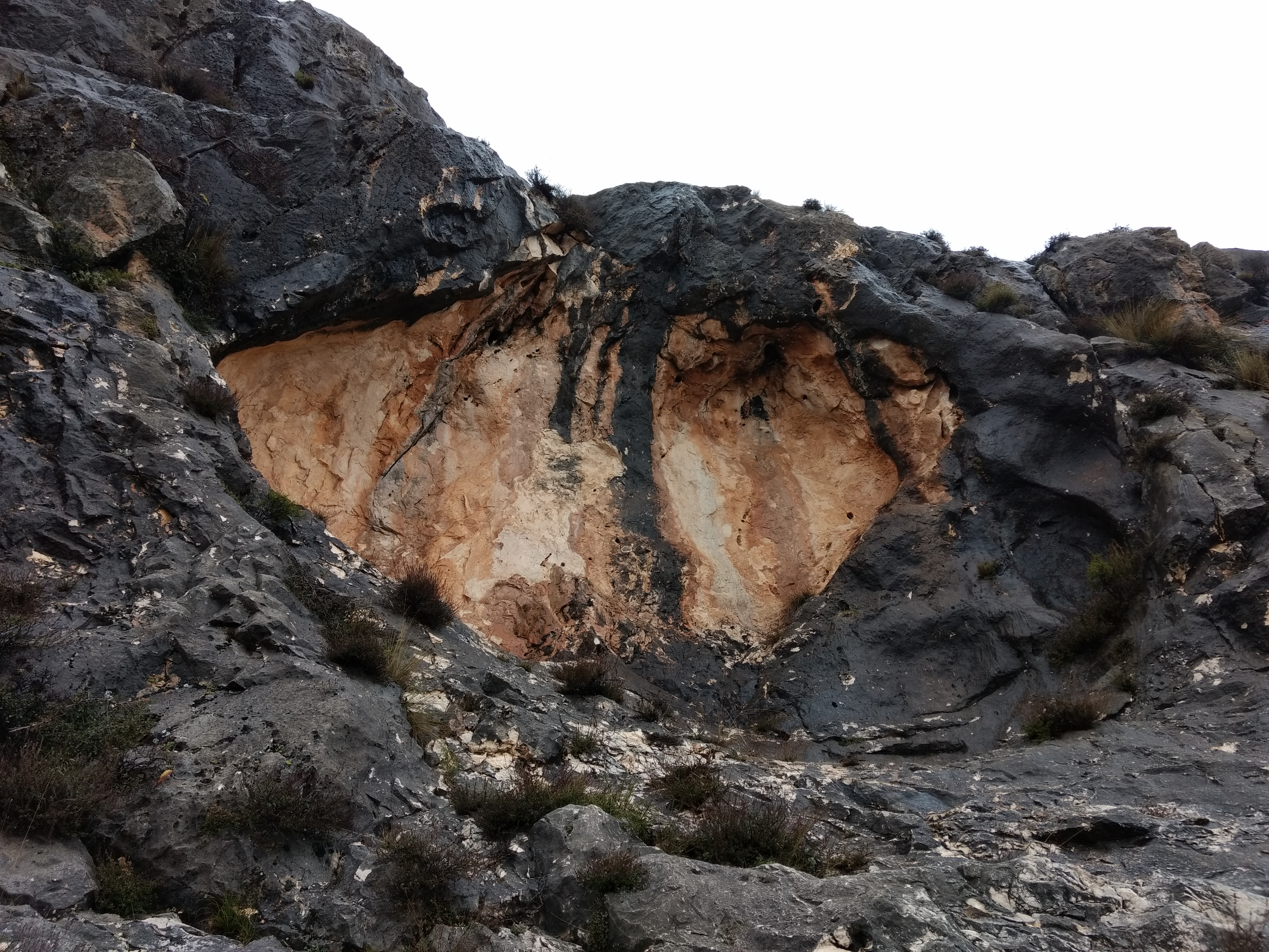 Vista del Abrigo de las Colmenas